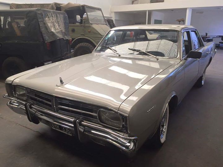 Dodge Polara o quizas Dodge Valiant 1969